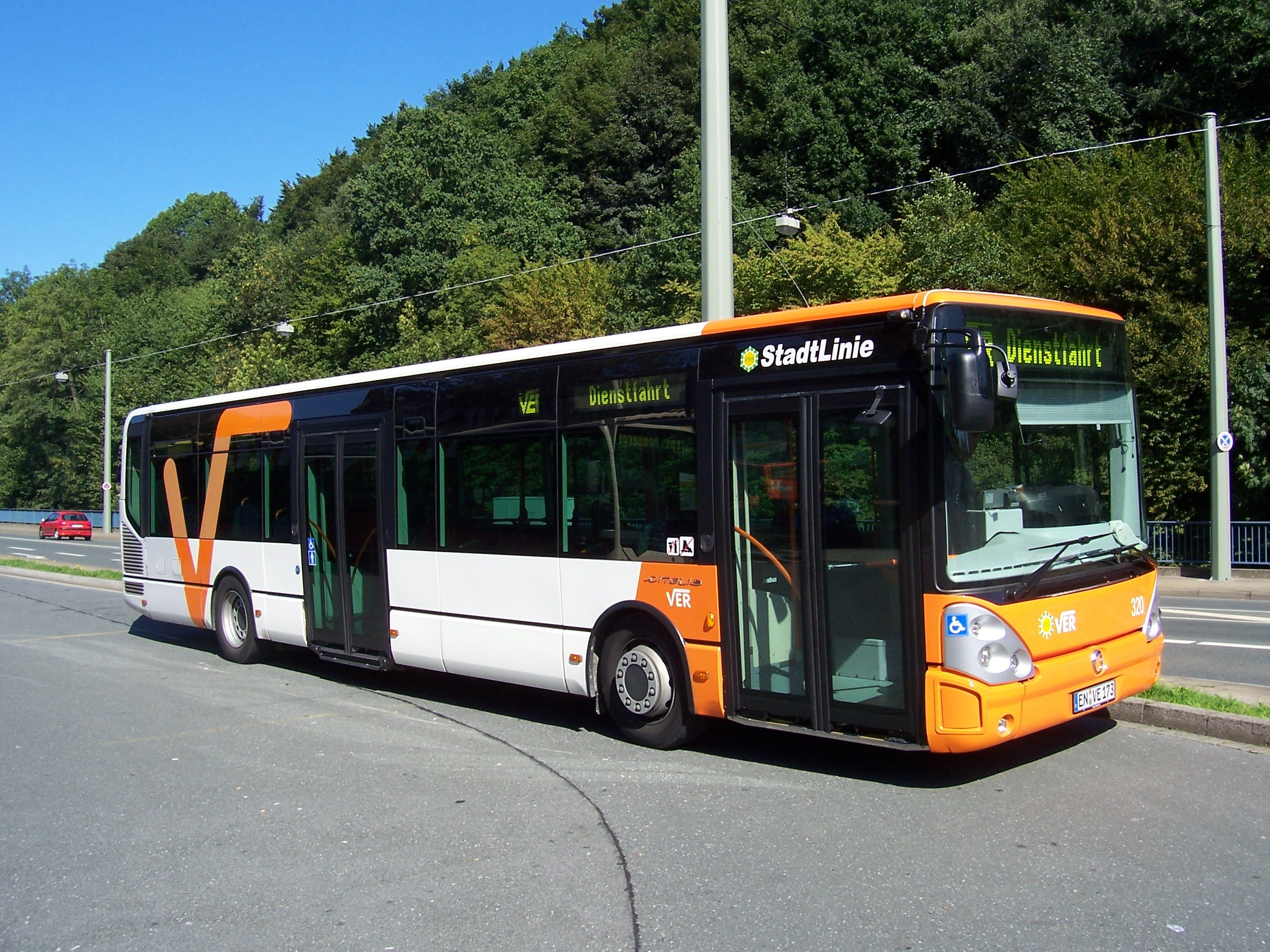 Ein Irisbus Citelis Stadtbus der Verkehrsgesellschaft Ennepe-Ruhr (VER) an der Haltestelle Ennepetal Busbahnhof